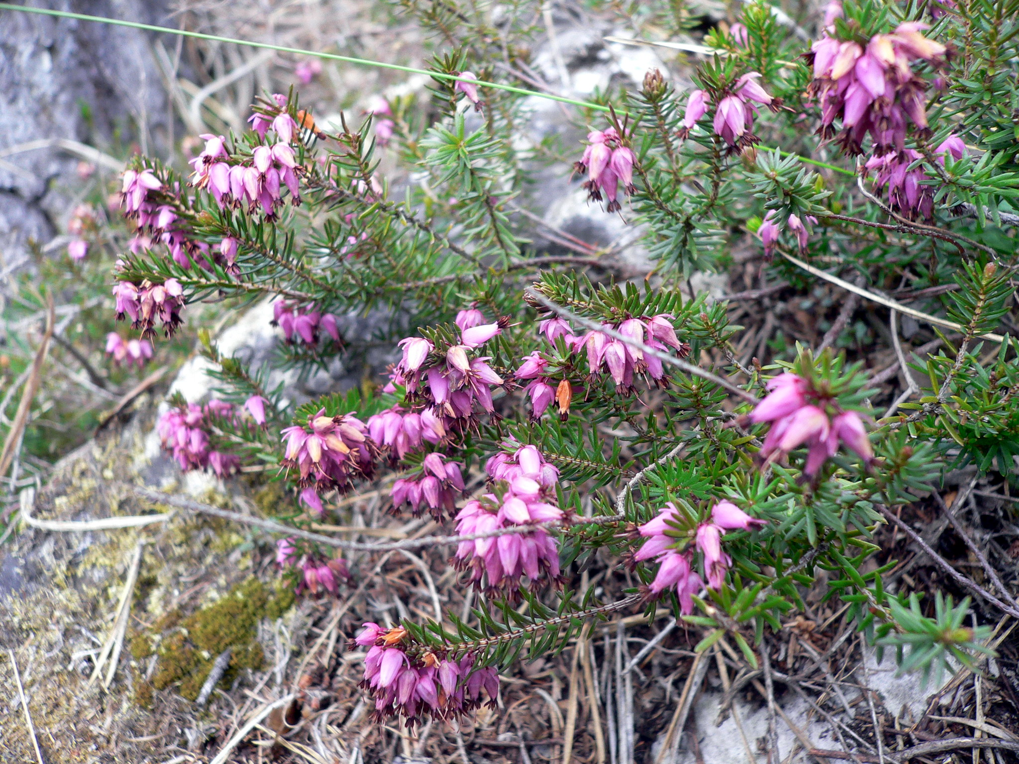 "Cuscino" di Erica carnea